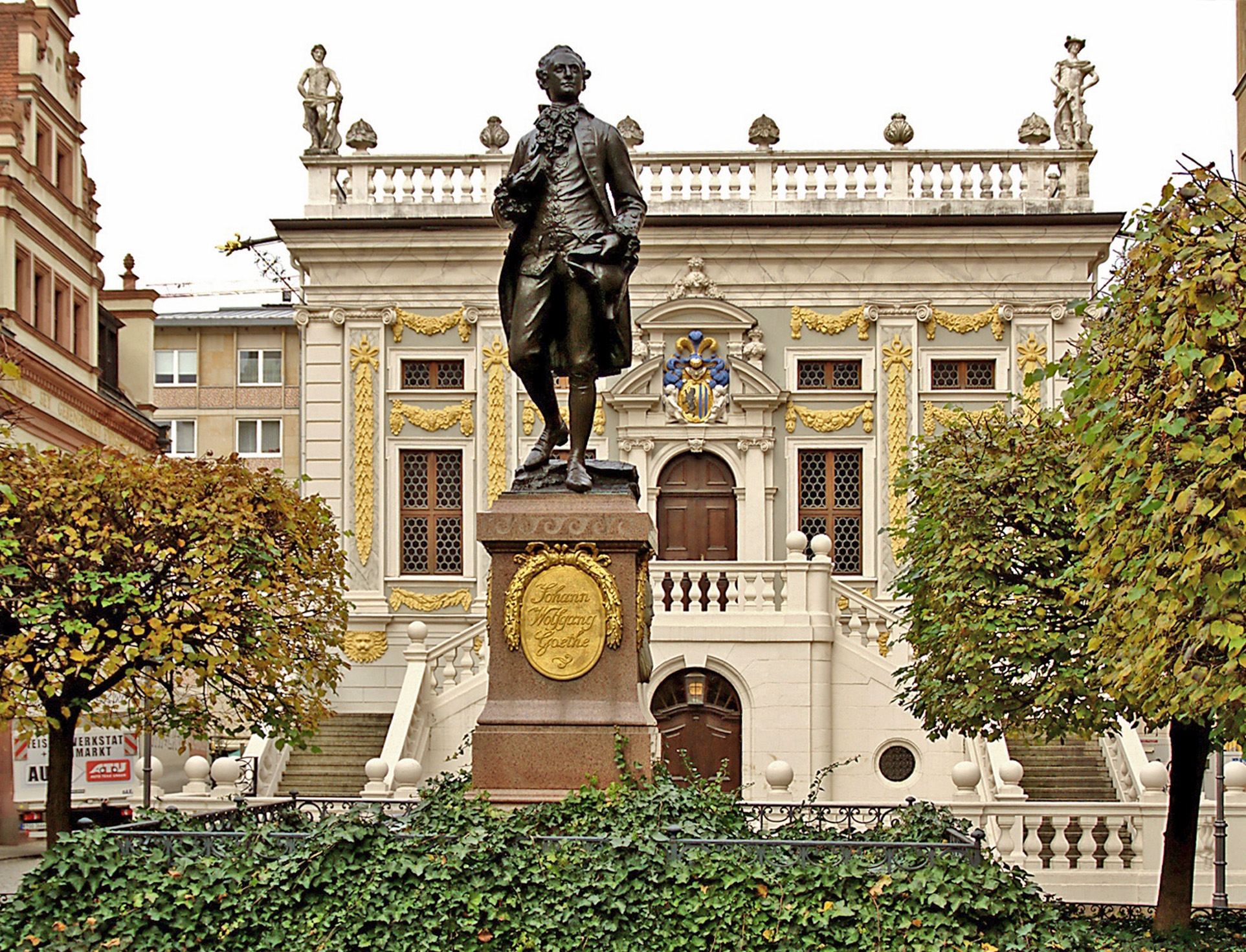 Goethe-Statue vor der alten Leipziger Handelsbörse (Naschmarkt)